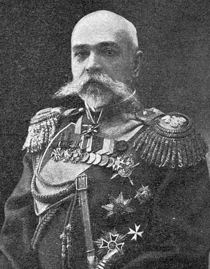 Фёдор Фёдорович Трепов (младший) (1854—1938) — русский военный и государственный деятель; генерал от кавалерии и генерал-адъютант.